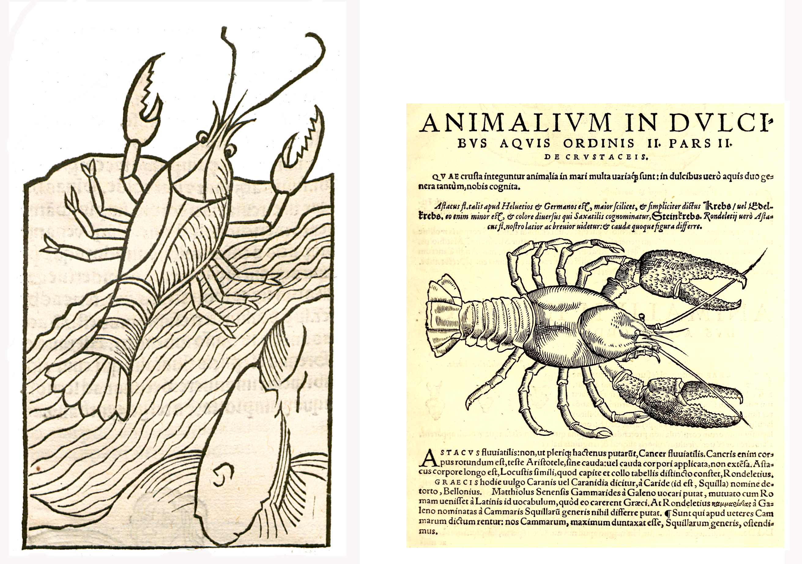 Abbildung von Astacus astacus